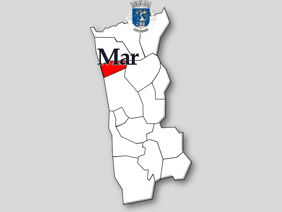 Censo 1864/2011